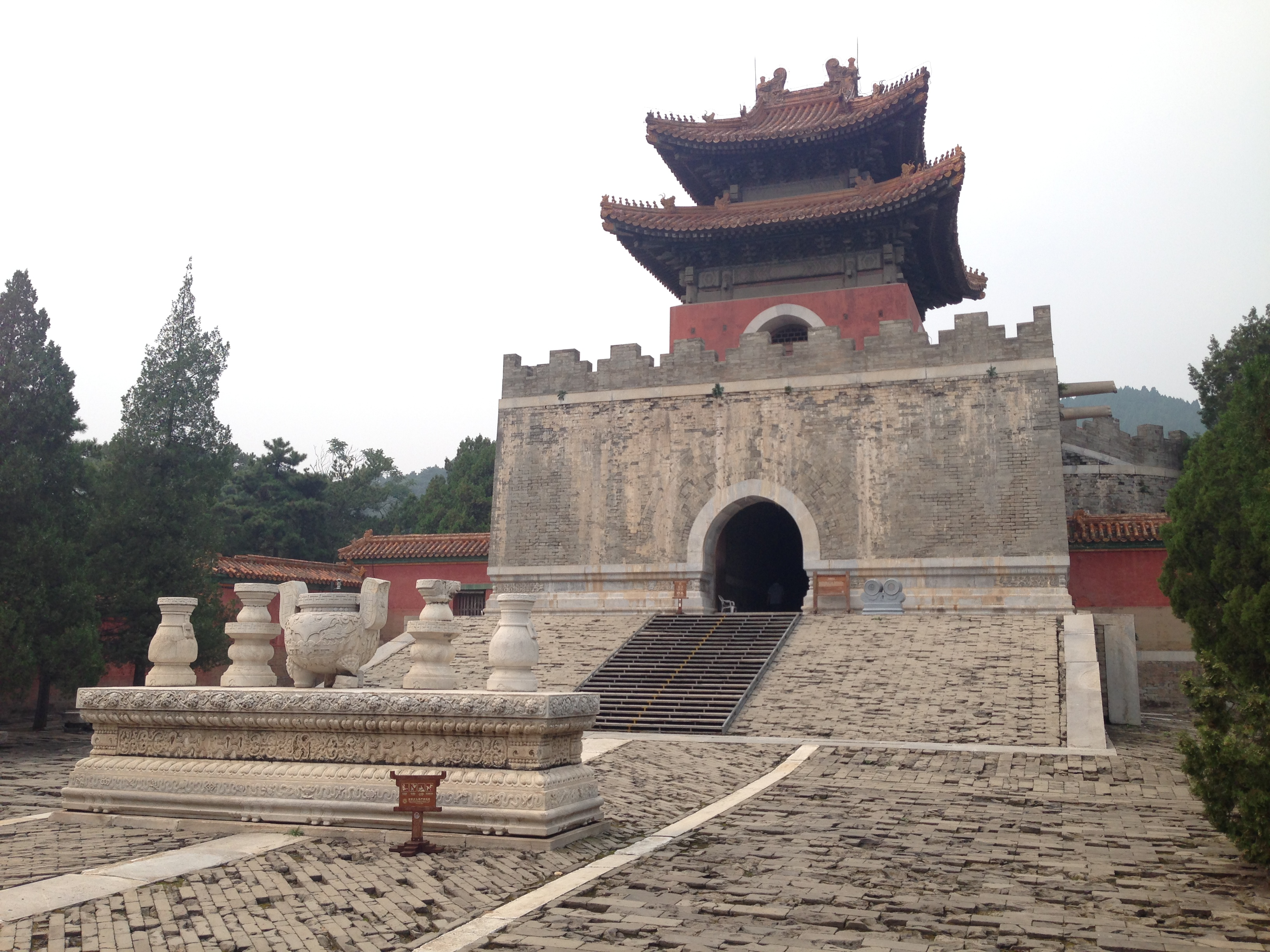 Själstornet i Cixis mausoleum